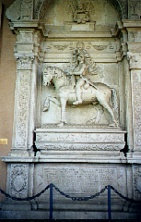 Tomba di Brunoro II Zampeschi, signore di Forlimpopoli.